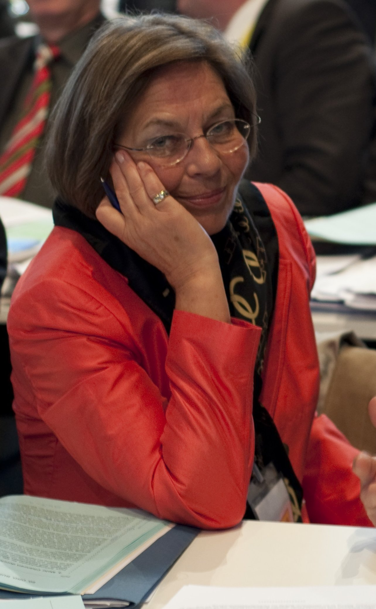 Renate Will, FDP-Landtagsabgeordnete und bildungspolitische Sprecherin